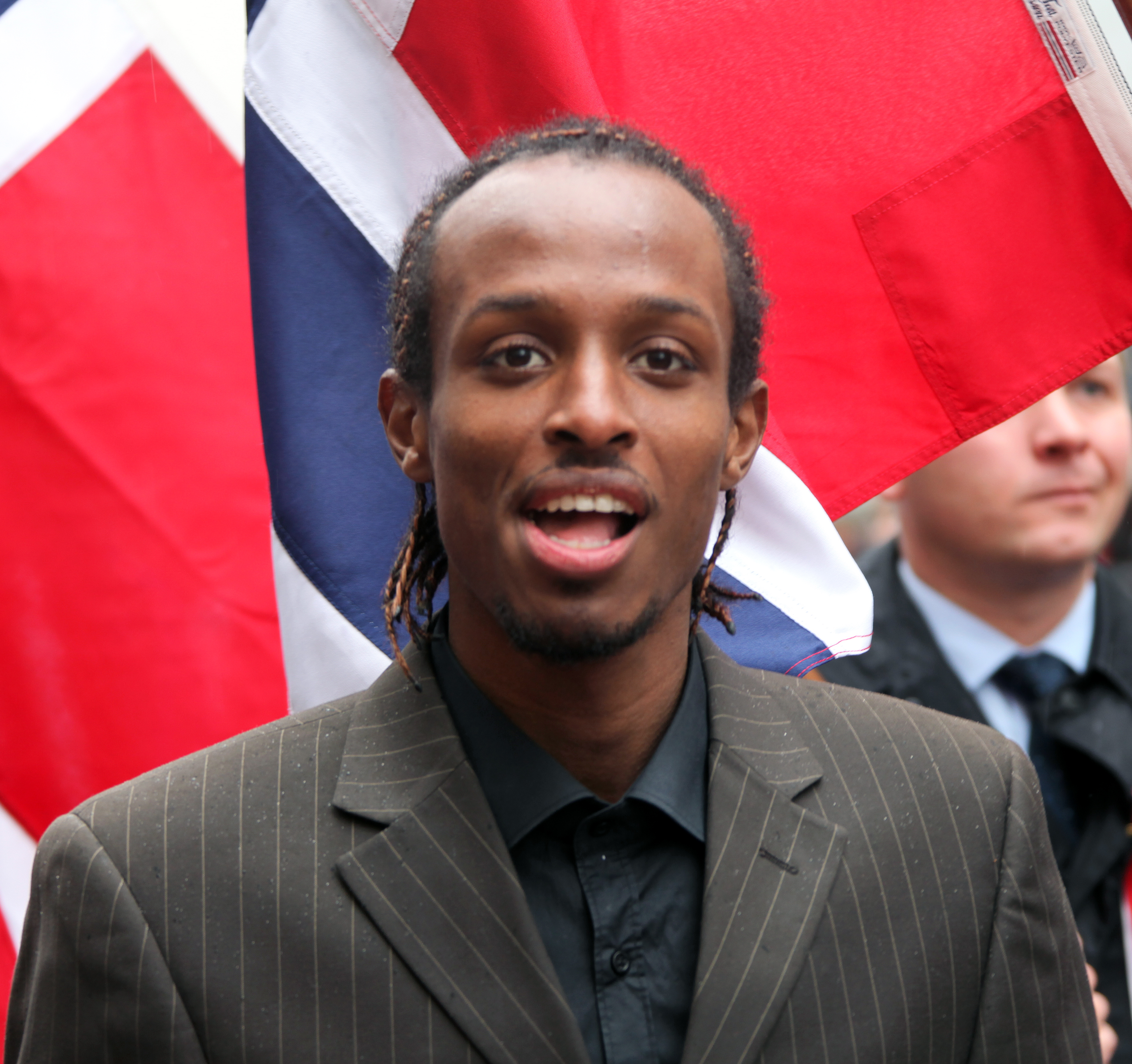 Amin Askar